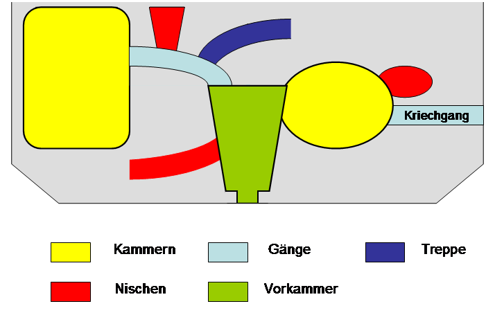 Albucciu